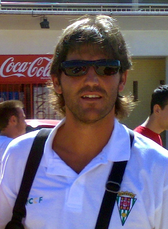 Yordi / Córdoba CF